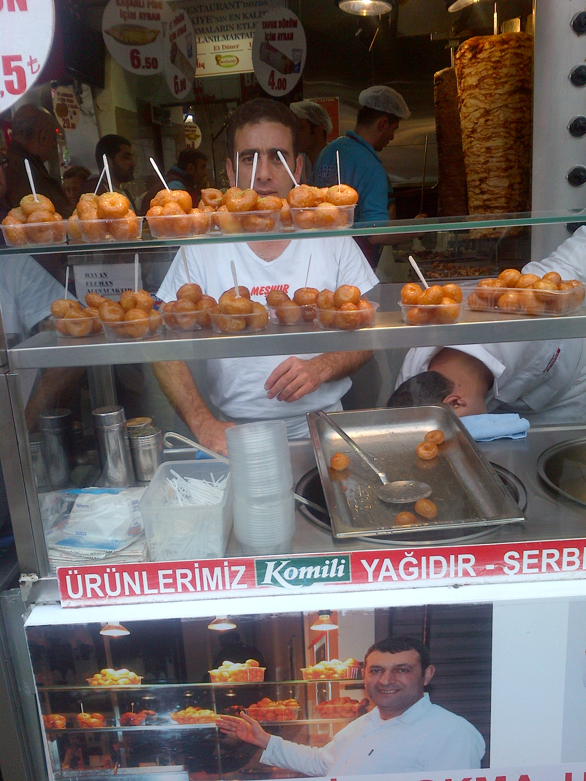 Lokma, un dulce de masa frito, de la cocina turca.